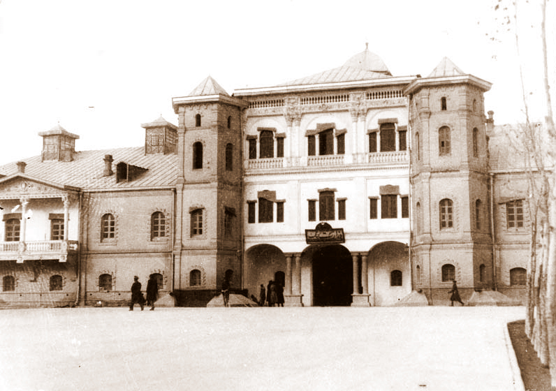 ساختمان وزارت جنگ (قزاقخانه) در دوره رضاشاه